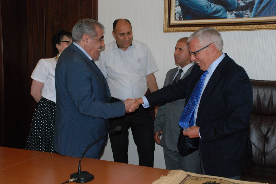 Sabir Əliyev (Əliyev Sabir Cahan oğlu; d. 1944. Əmirxeyir, Çəmbərək rayonu, Ermənistan SSR, SSRİ) — Azərbaycan Tibb Universitetinin tədris işləri üzrə prorektoru